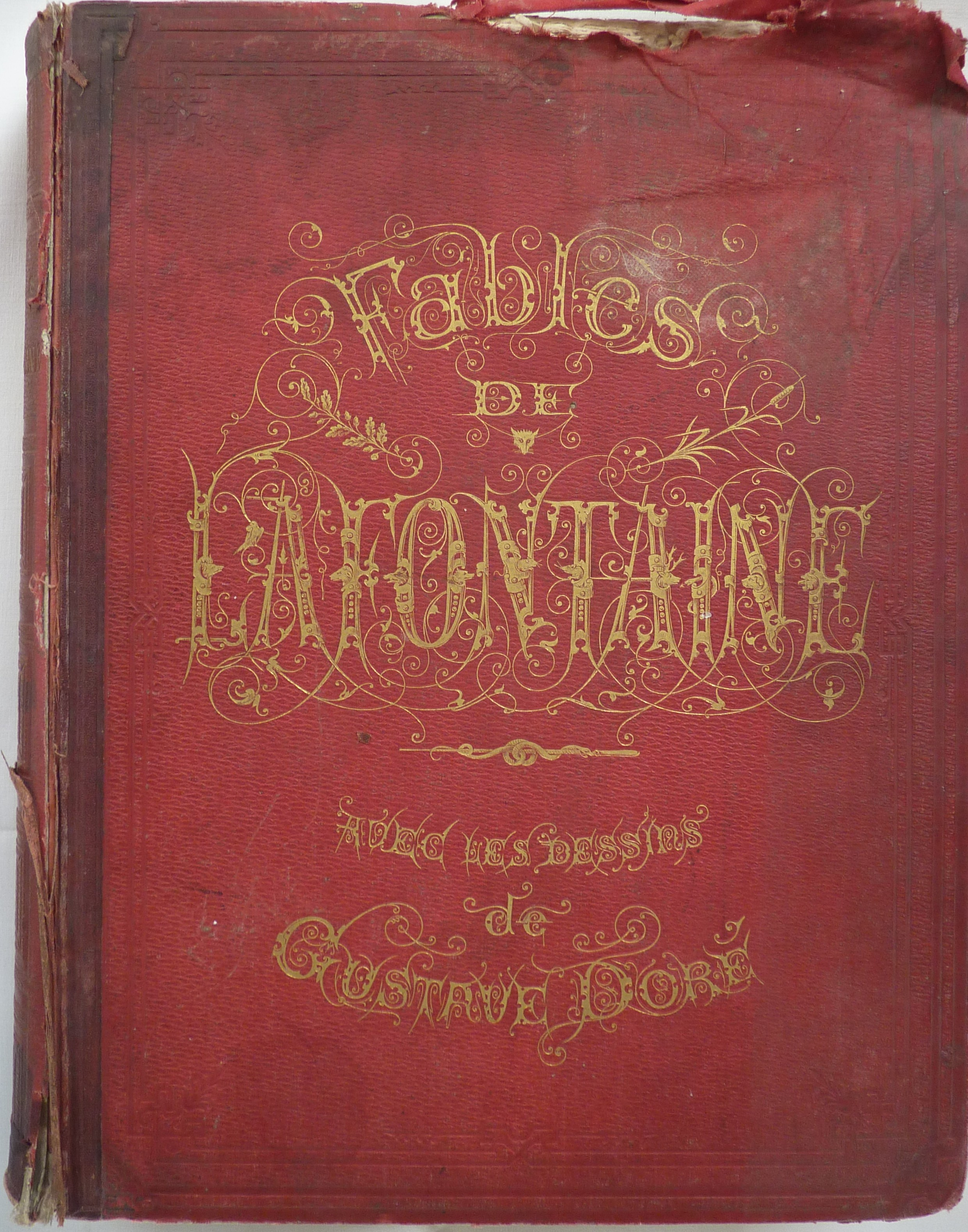 egzemplarz bajek La Fontaine'a z roku 1868: Fables de La Fontaine avec les dessins de Gustave Doré; Paris, Librairie de L. Hachette et Cie, Boulevard Saint-Germain, № 77, 1868